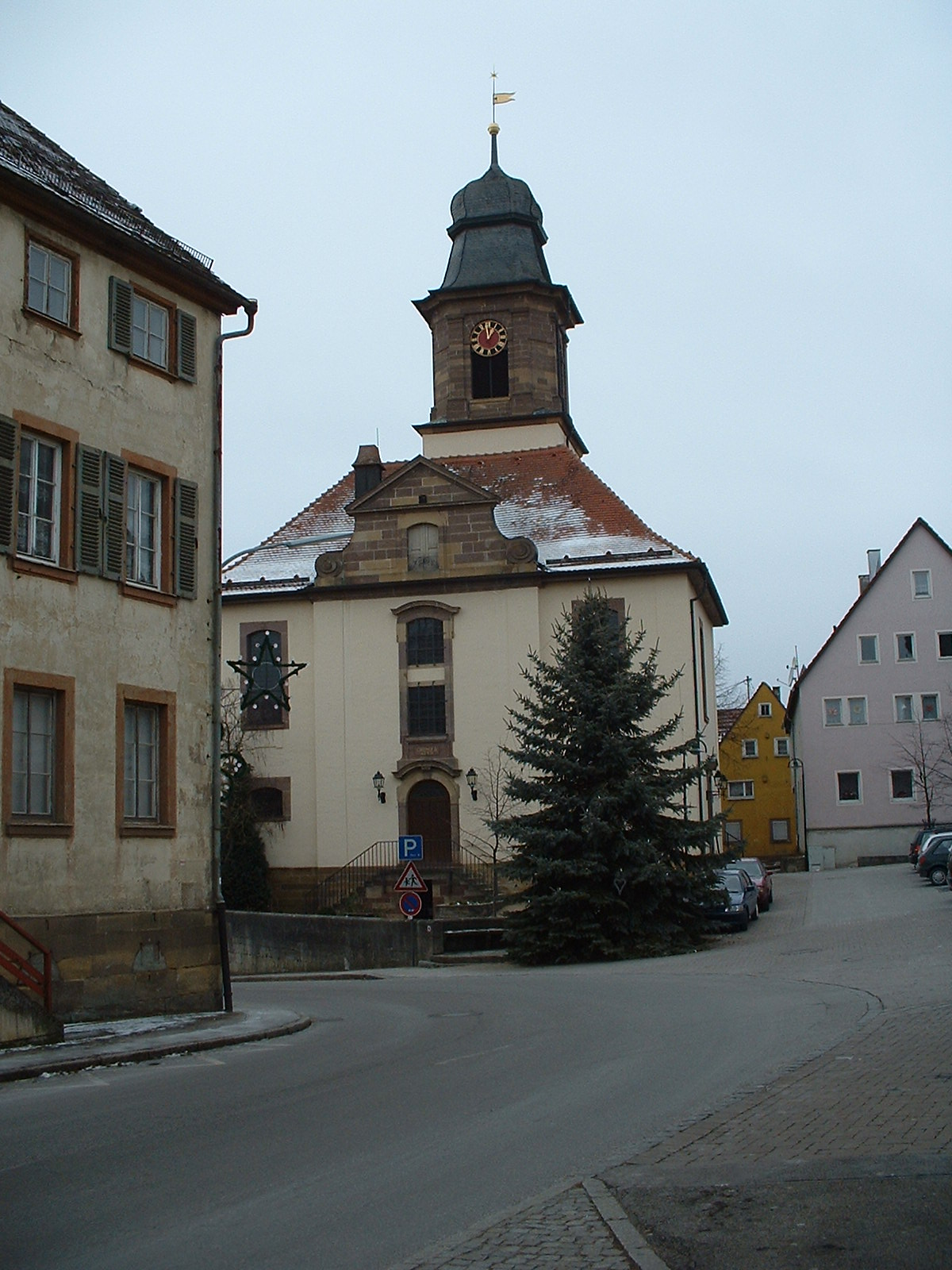 Evangelische Kirche in Gerabronn